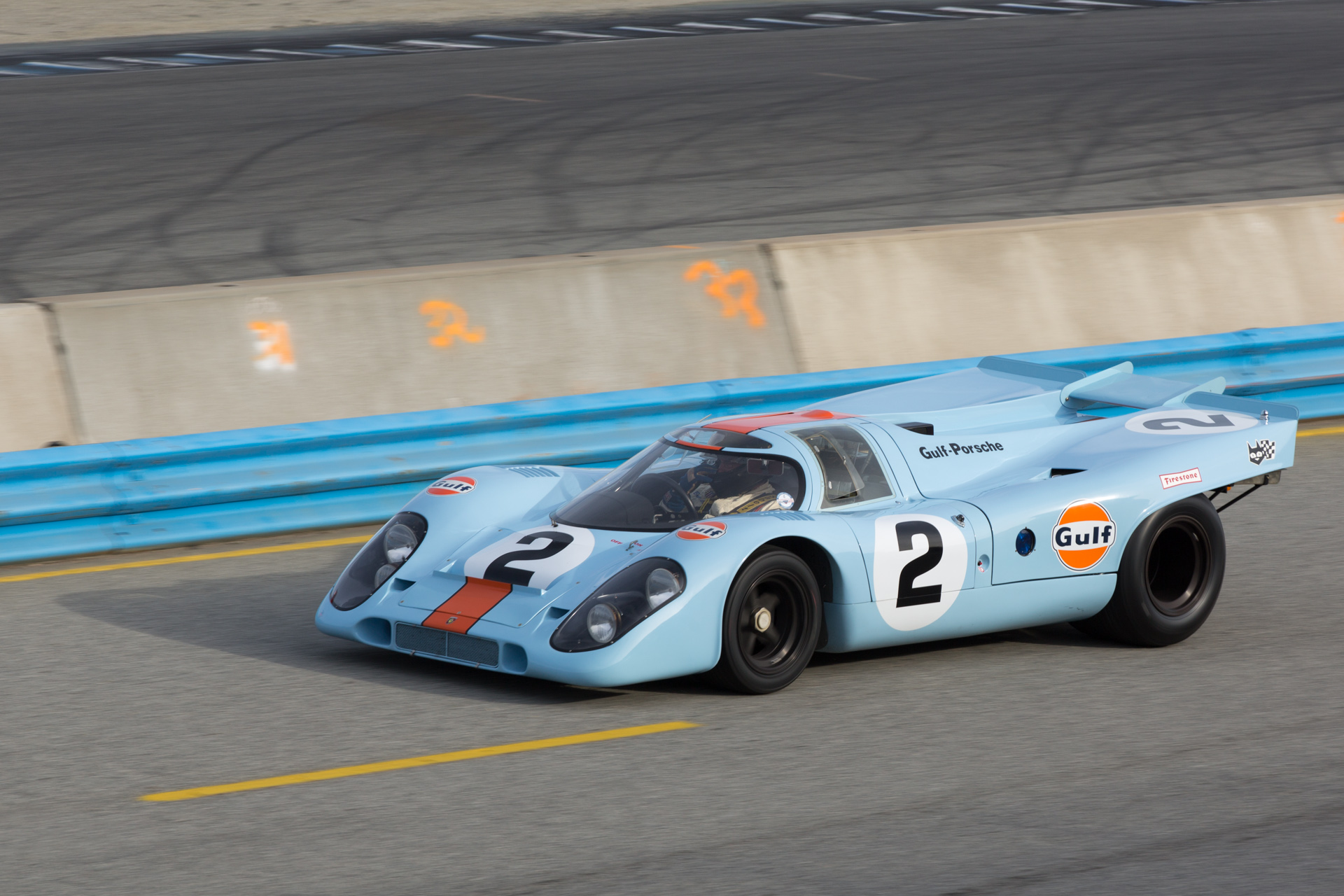 Rennsport Reunion V